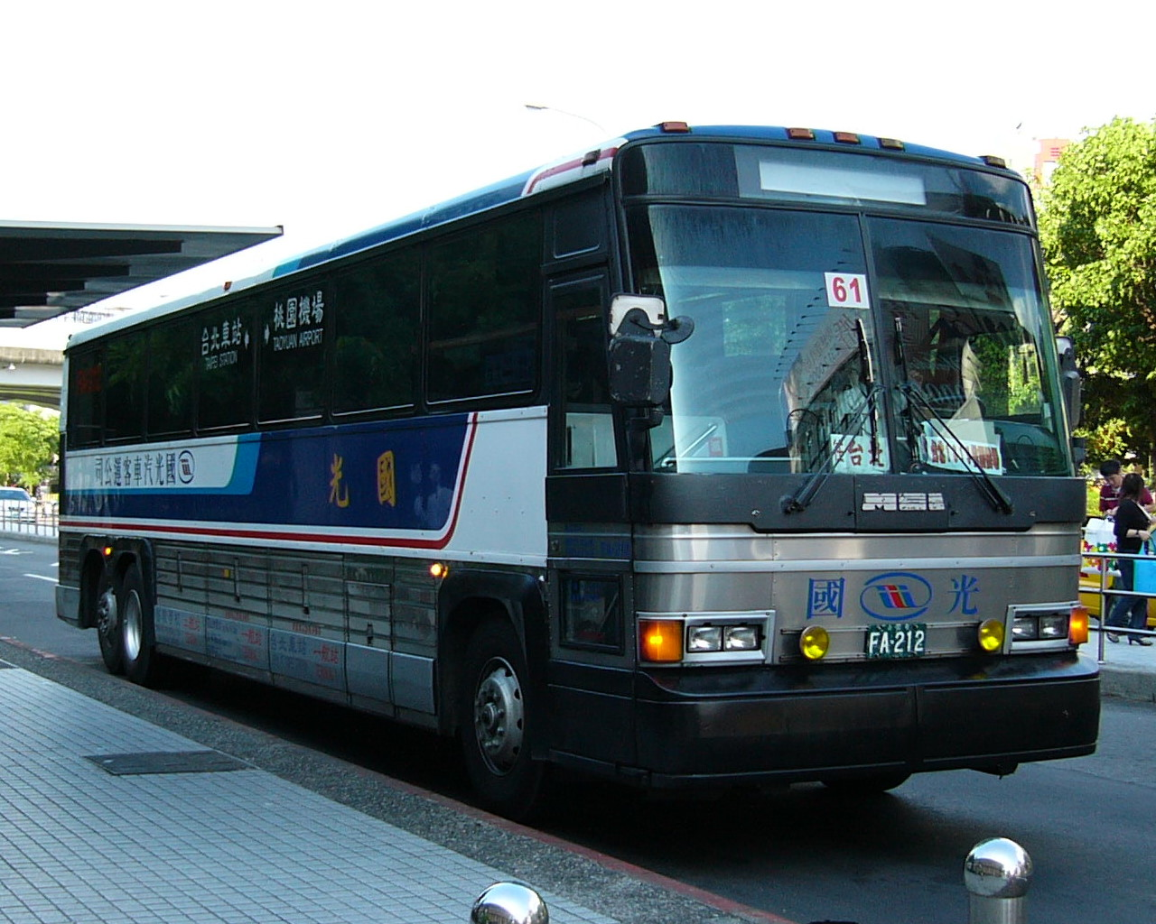 國光客運的MCI大客車FA-212右前方外觀